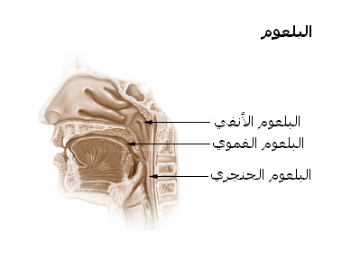 صورة أجزاء البلعوم